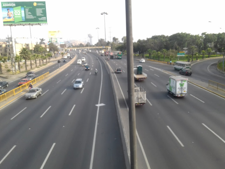 autopista limeña.